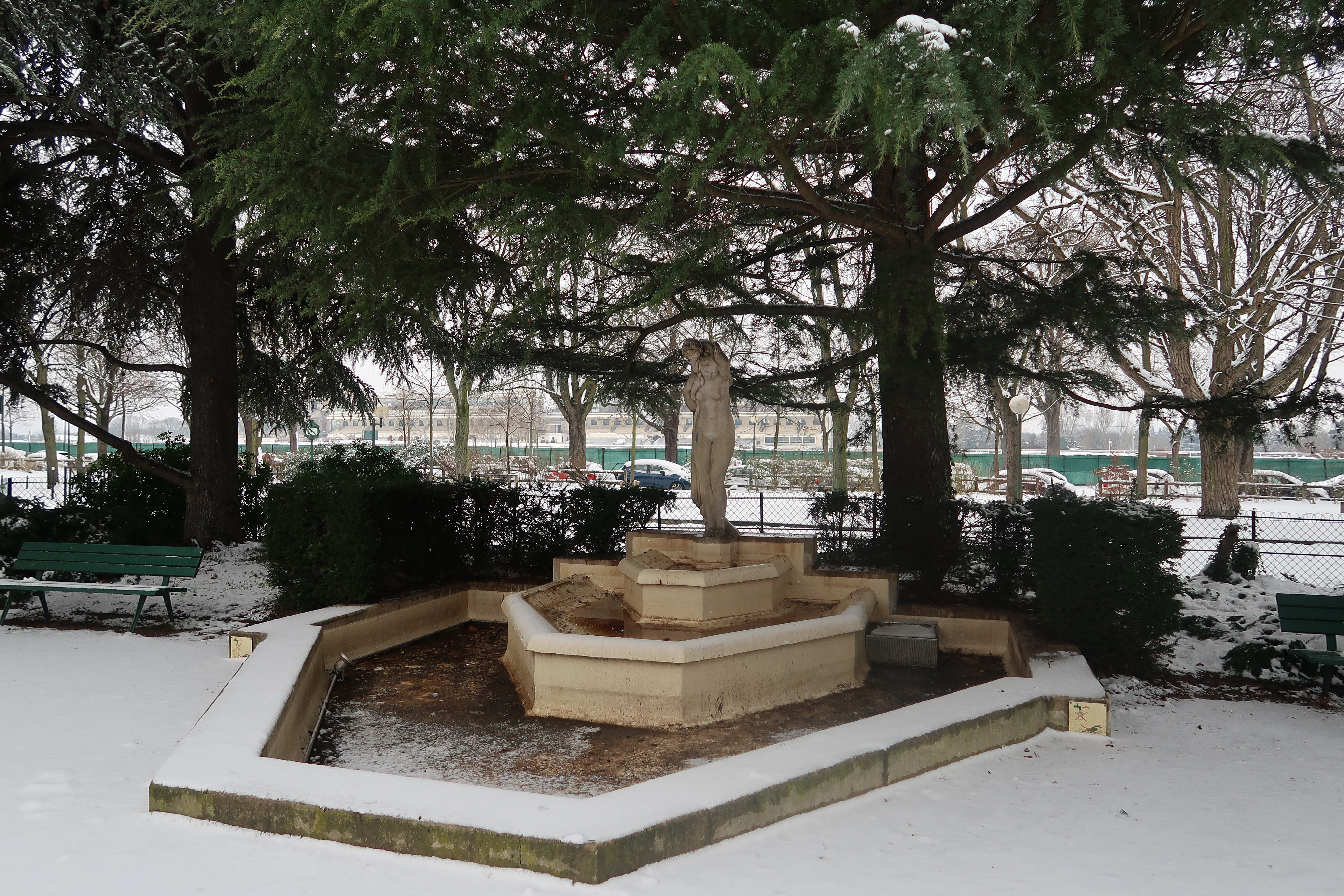 Fontaine dans le square Tolstoï, sous la neige (Paris, 16e).